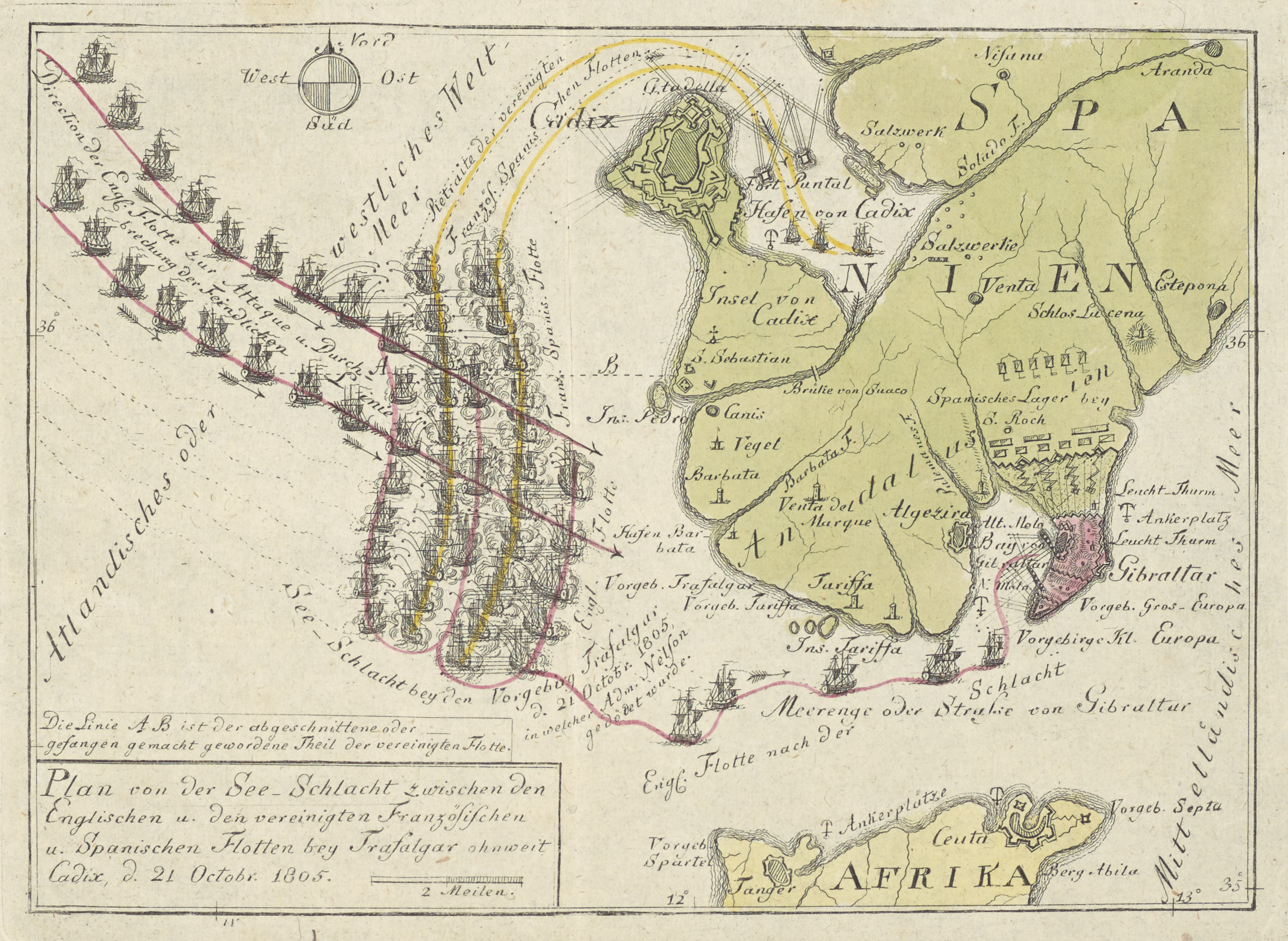 1 Kt. : flächenkolor. (21 x 15 cm) ; Koordinaten W 6°30'00"-W 5°08'00"/N 36°33'00"-N 35°45'00" ; Maßstab in graph. Form (Meilen). - Titel und Maßstab unten links. - Windrose oben links. - Flotten als Einzelschiffe. - Mit Angriffs- und Schlachtverlauf der Flotten. - Schiffsdarstellung unmaßstäblich. - Mit Text in Kt. - Mit Anmerkung: Die Linie A B ist der abgeschnittene oder gefangen gemacht gewordene Theil der vereinigten Flotte. - Ohne Relief